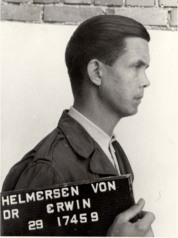 Erwin von Helmersen (* 4. November 1914 in Bremen; † 12. April 1949 in Krakau) war ein deutscher SS-Hauptsturmführer (1944) und als Lagerarzt in dem Konzentrationslager KZ Auschwitz-Birkenau eingesetzt